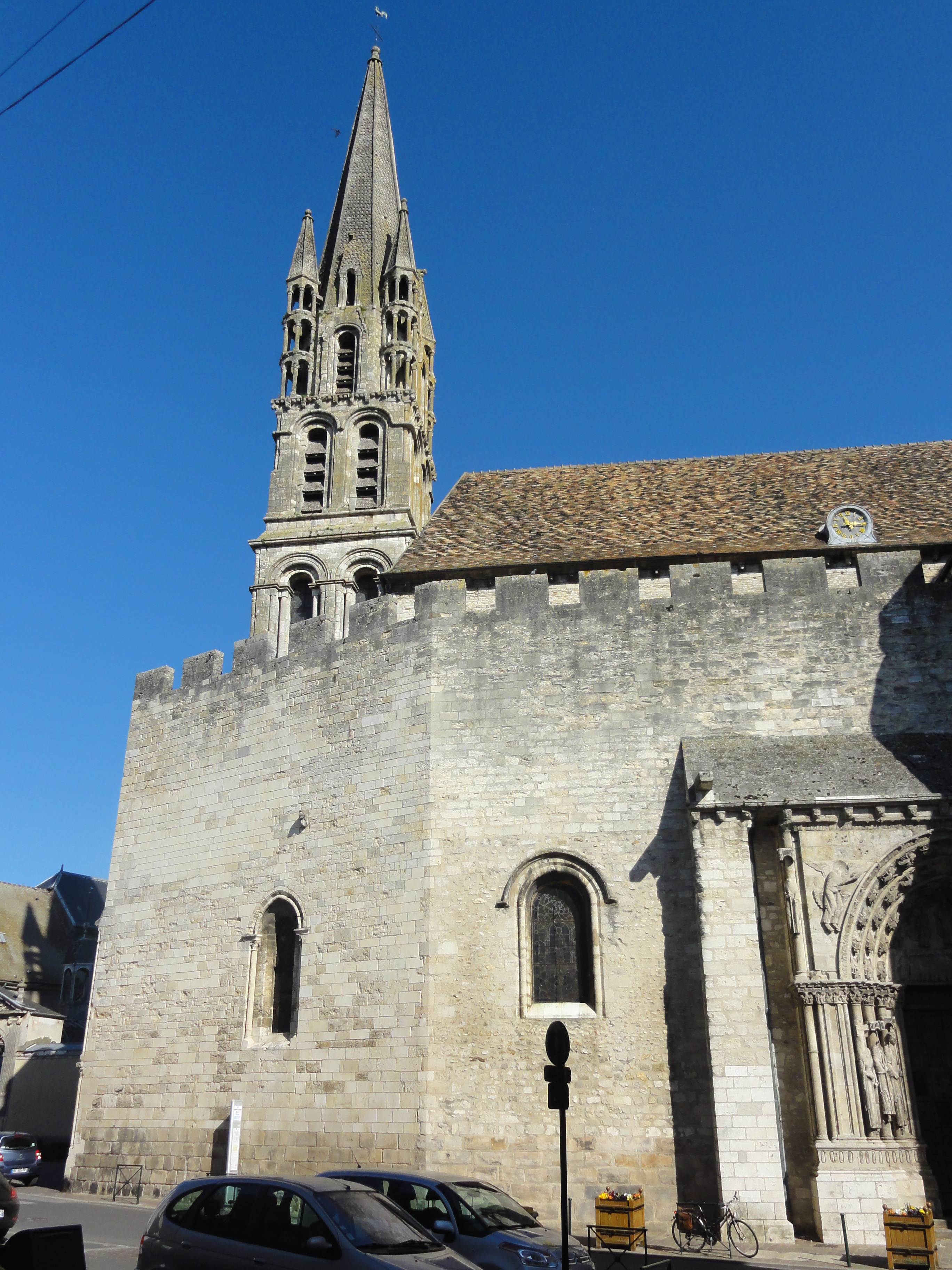 Nef, élévation sud.